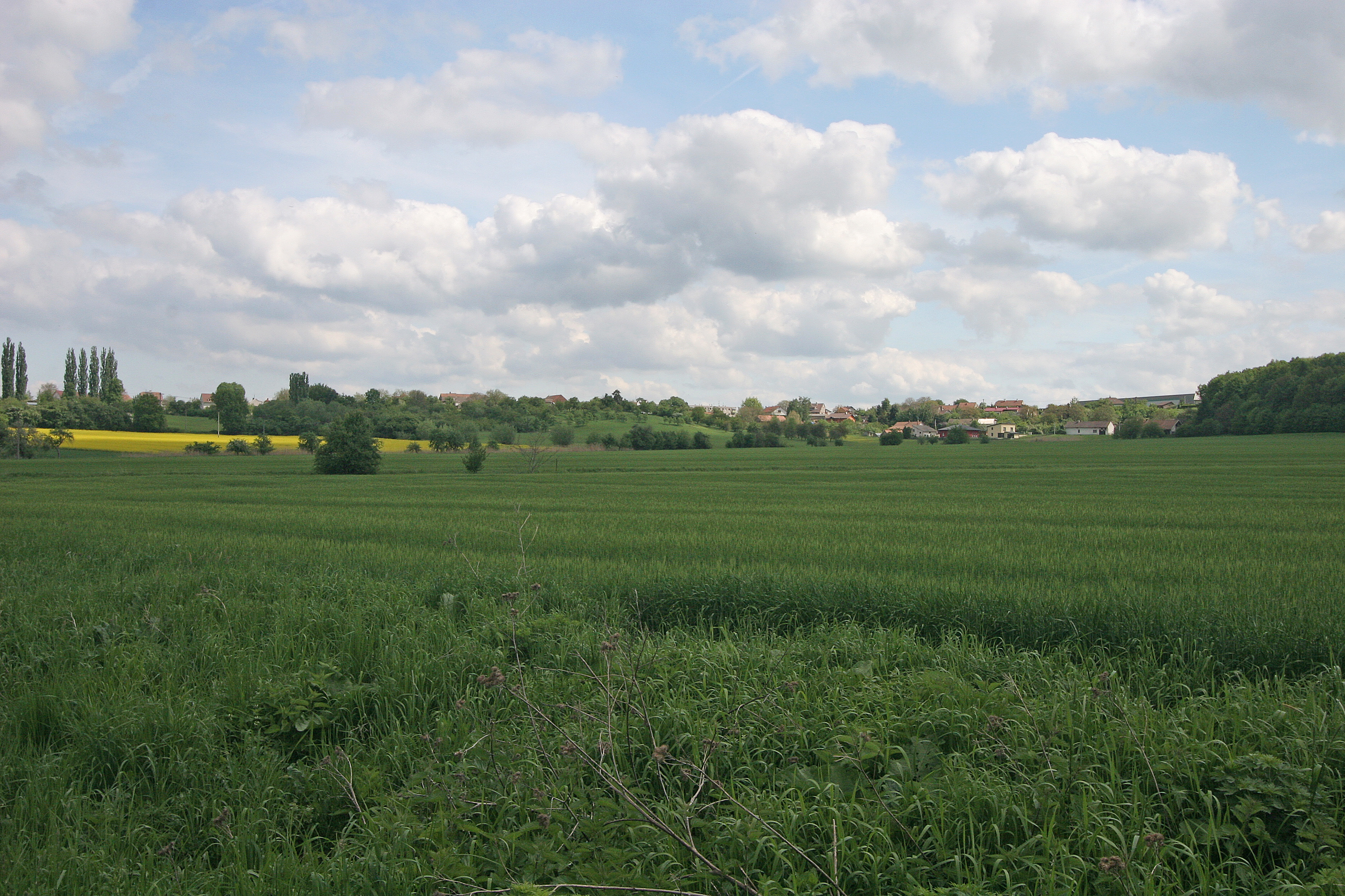 Dobřenice